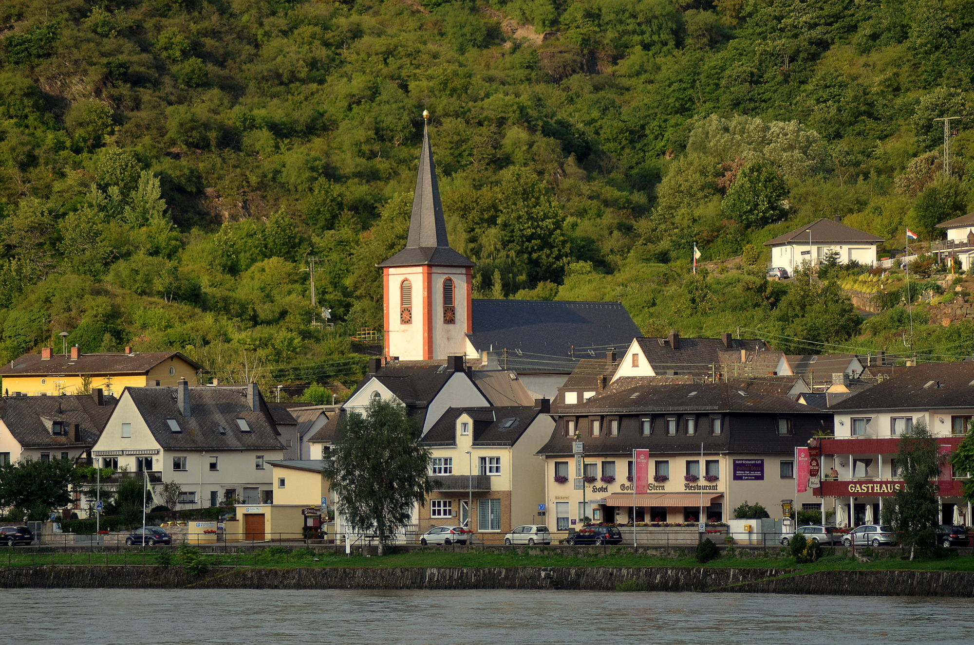 Kestert aan de Rijn